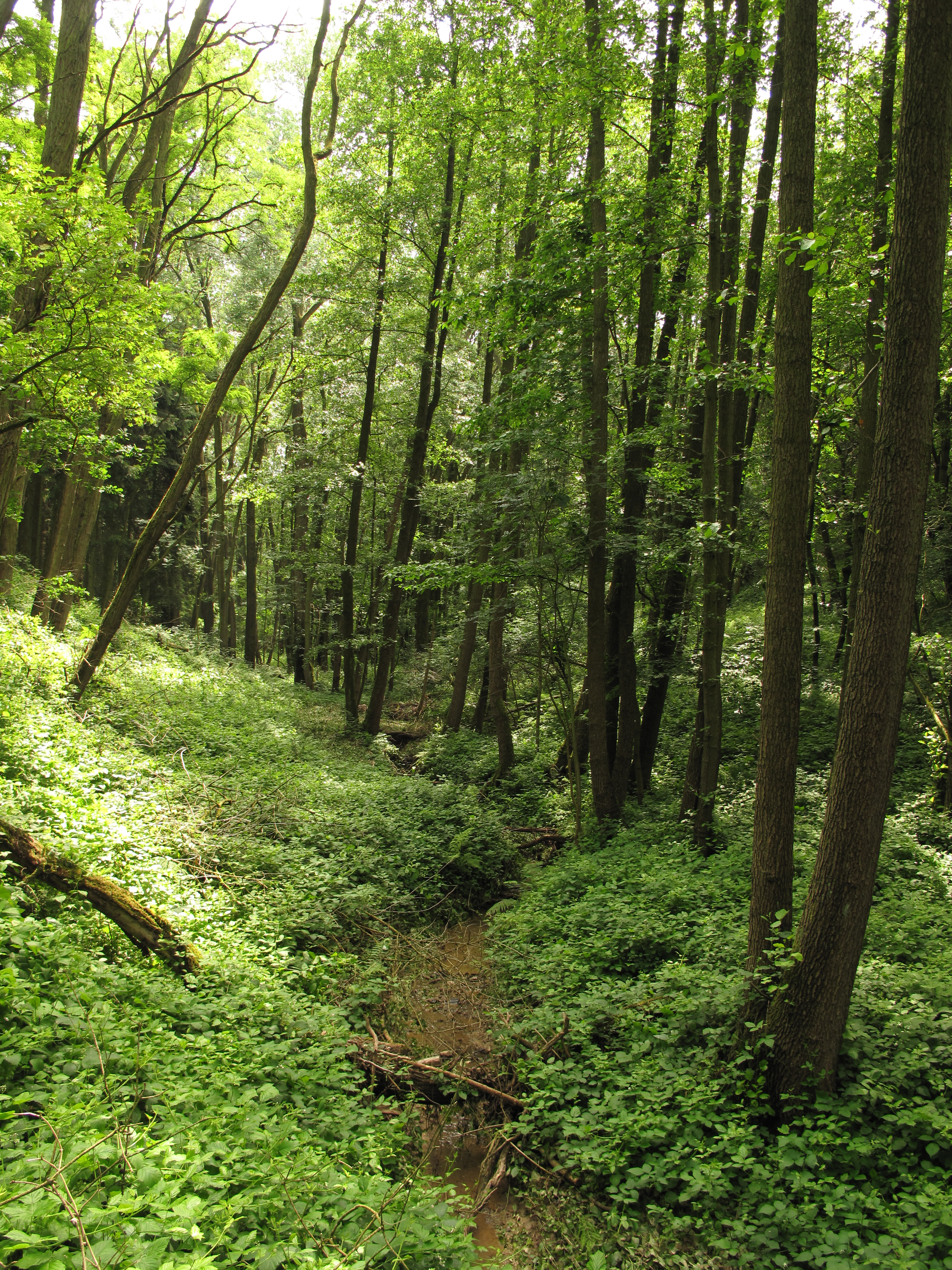 Olšanský potok v lese nedaleko Nové Lhoty. Okres Kutná Hora, Česká republika.